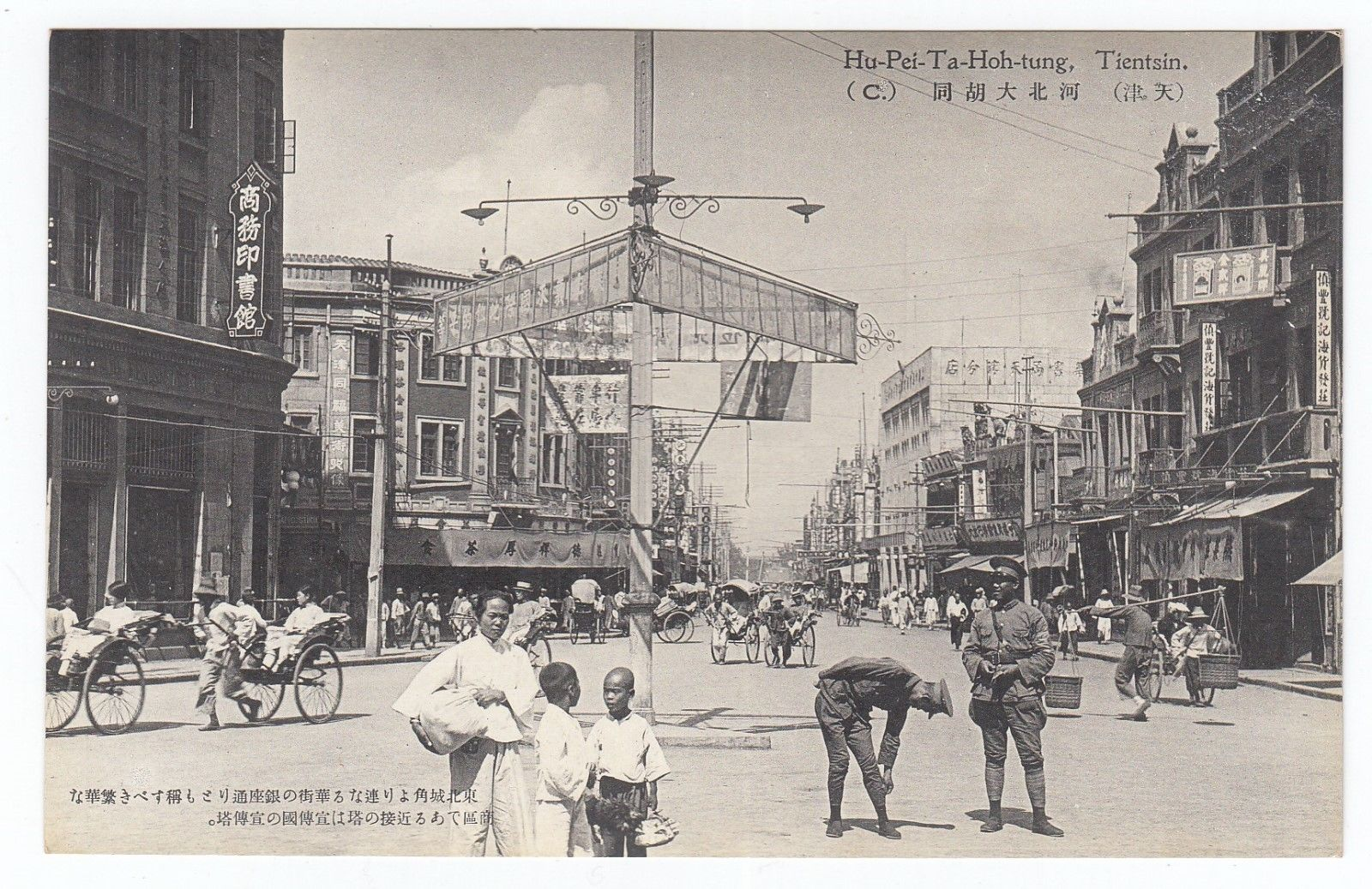 天津河北大胡同